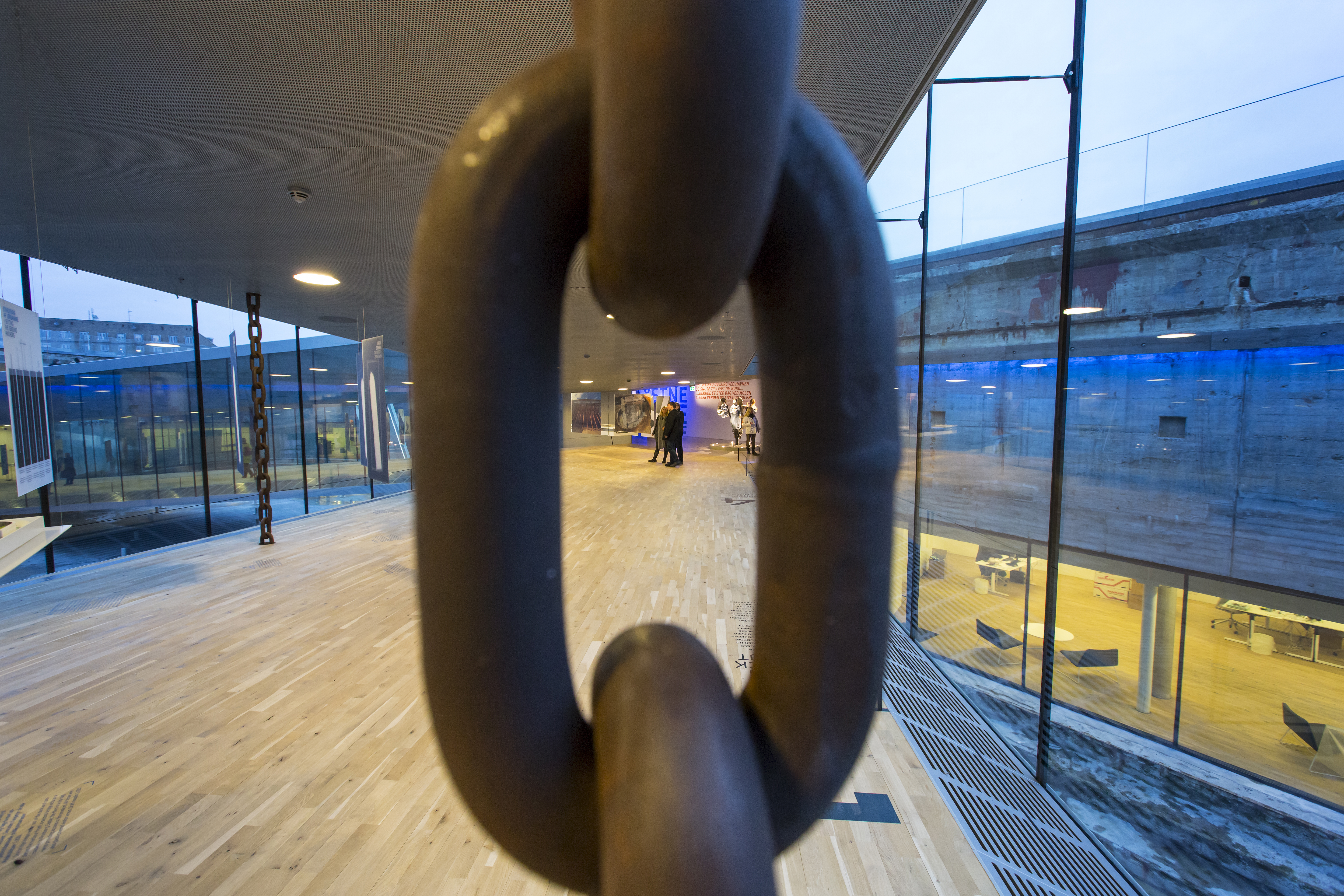 Danish Maritime Museum in Helsingør, Denmark